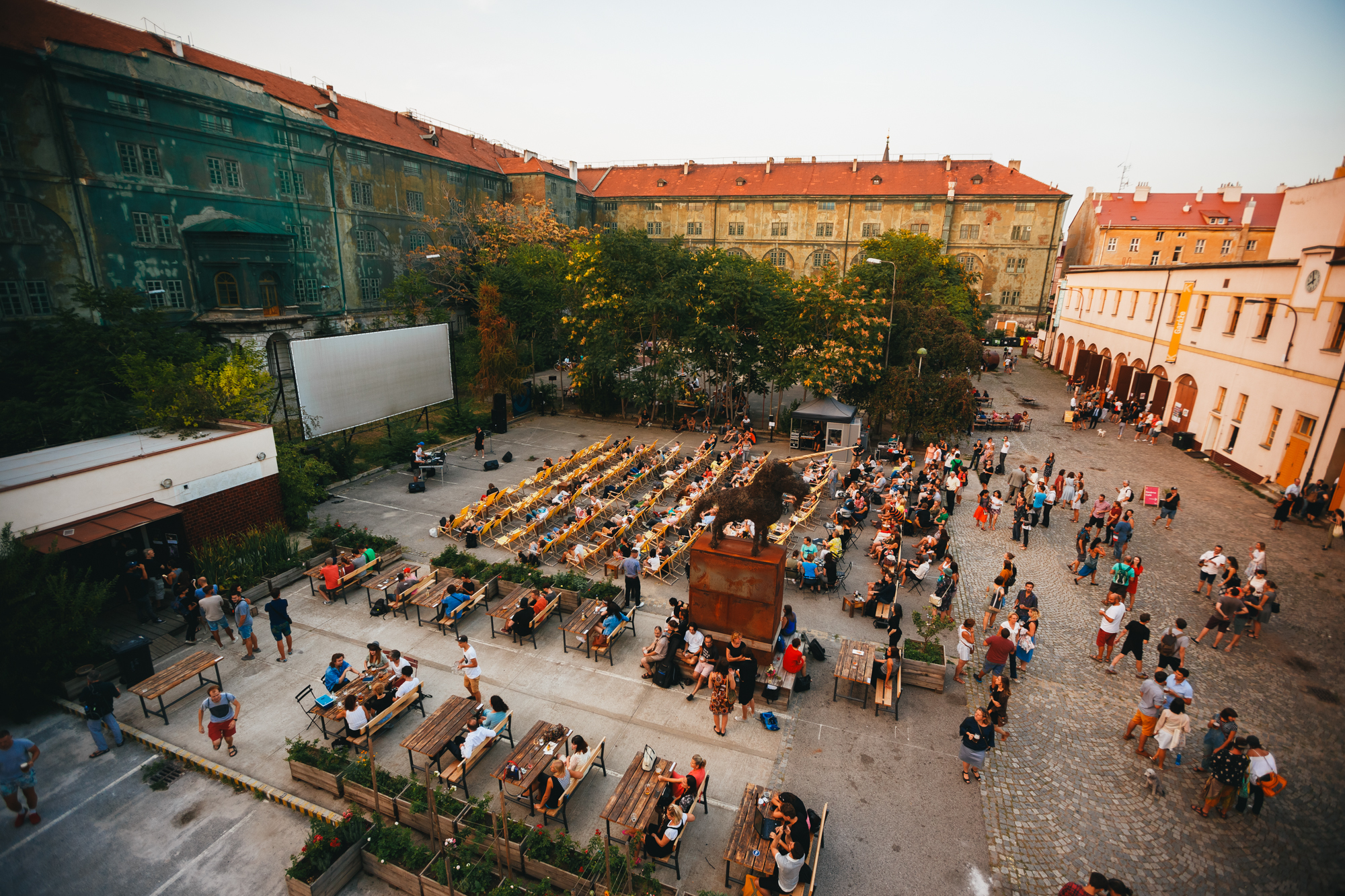 Nádvoří Karlínských kasáren s letním kinem a se sochami Čestmíra Sušky. Kulturně-společenský projekt Kasárna Karlín, který funguje v Karlínských kasárnách v Praze 8 od roku 2017. Na základě spolupráce Ministerstva spravedlnosti (ministr Robert Pelikán), radnice (místostarosta Petr Vilgus) a spolku Pražské centrum (skupina okolo Matěje Velka) byl oživen největší prázdný dům v Praze.